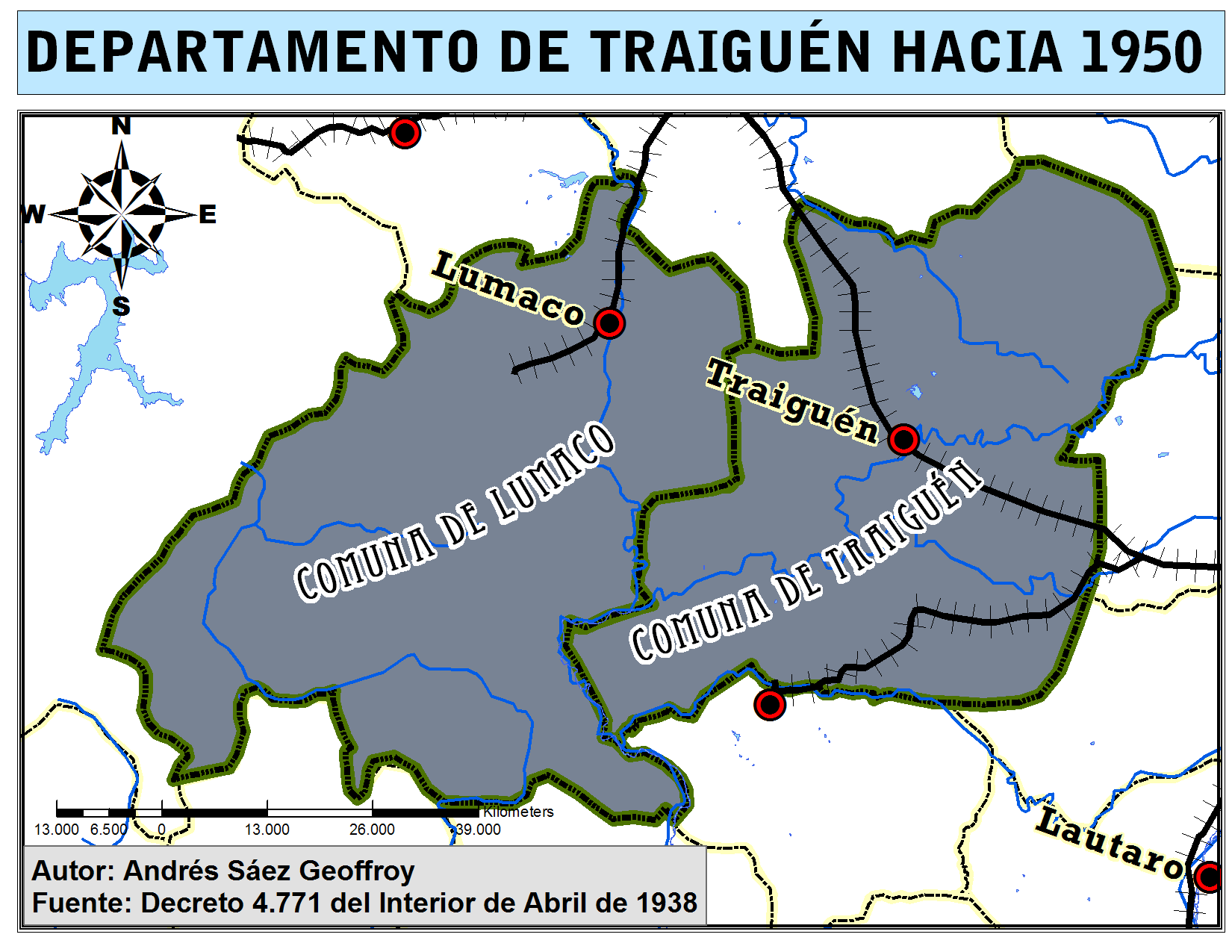 Departamento de Traiguén